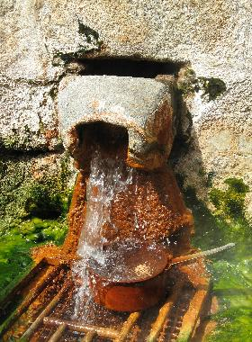 Source d'eau chaude avec résurgence naturelle 82°C